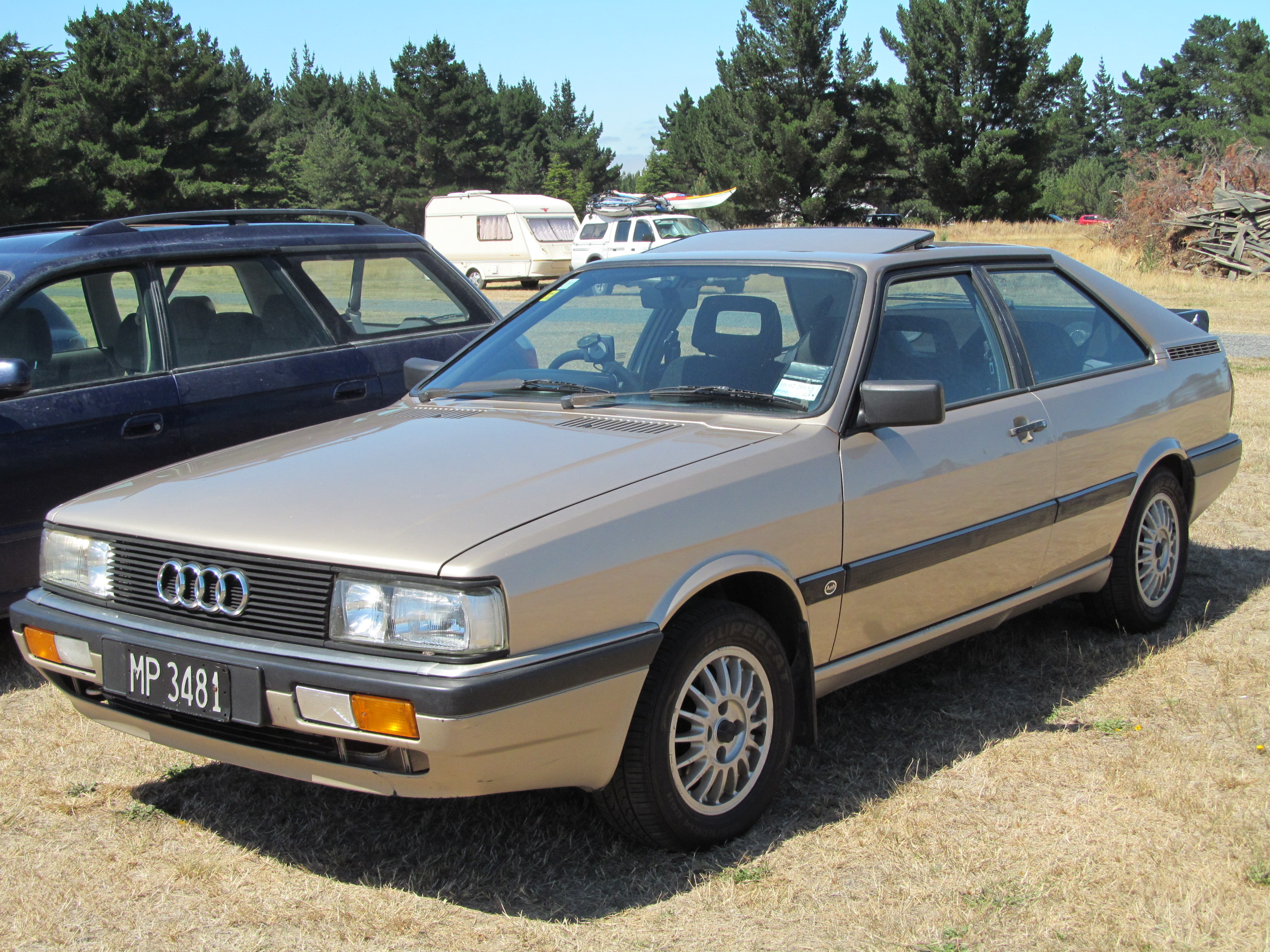 1986 Audi Coupe GT